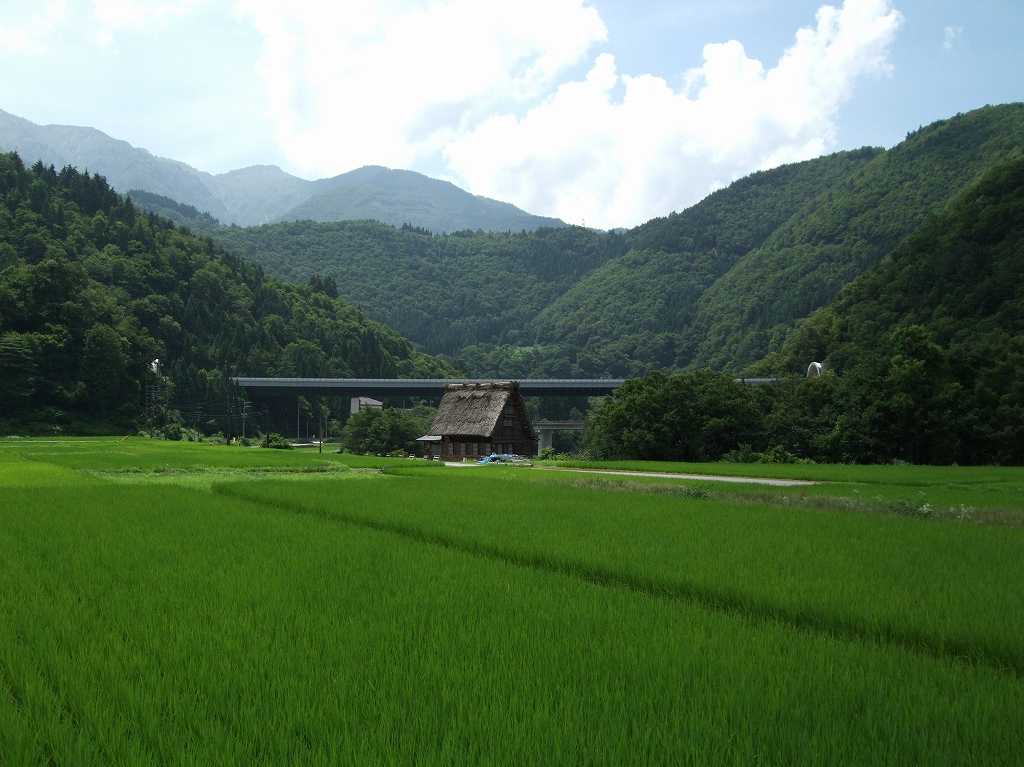 東海北陸自動車道白川橋と白川郷の合掌造り (飛騨清見IC～白川郷IC） 両端のトンネルは 左が飛騨トンネル、右が大牧トンネル